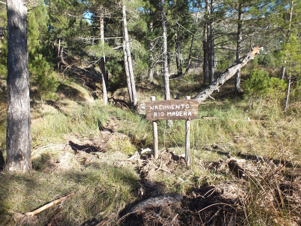 Nacimiento de Río Madera